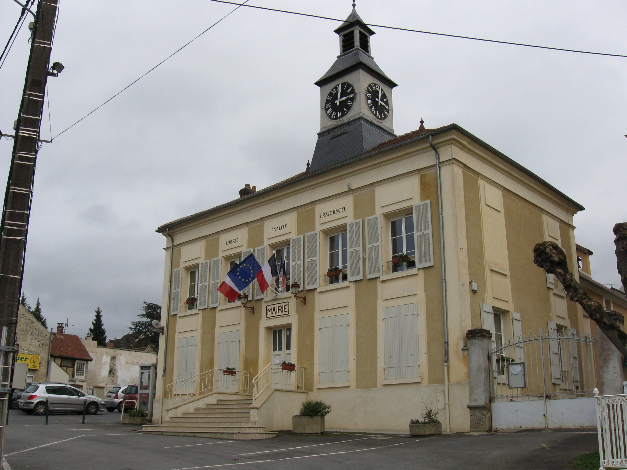 Mairie de Montreuil-aux-Lions, département de l'Aisne (région Picardie).